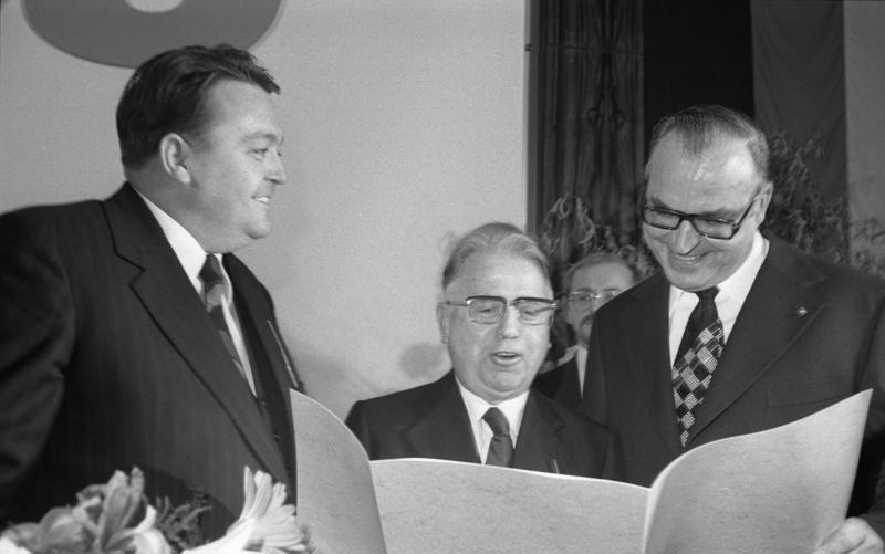 Empfang "25 Jahre Bundes-CDU" im Konrad-Adenauer-Haus, Bonn